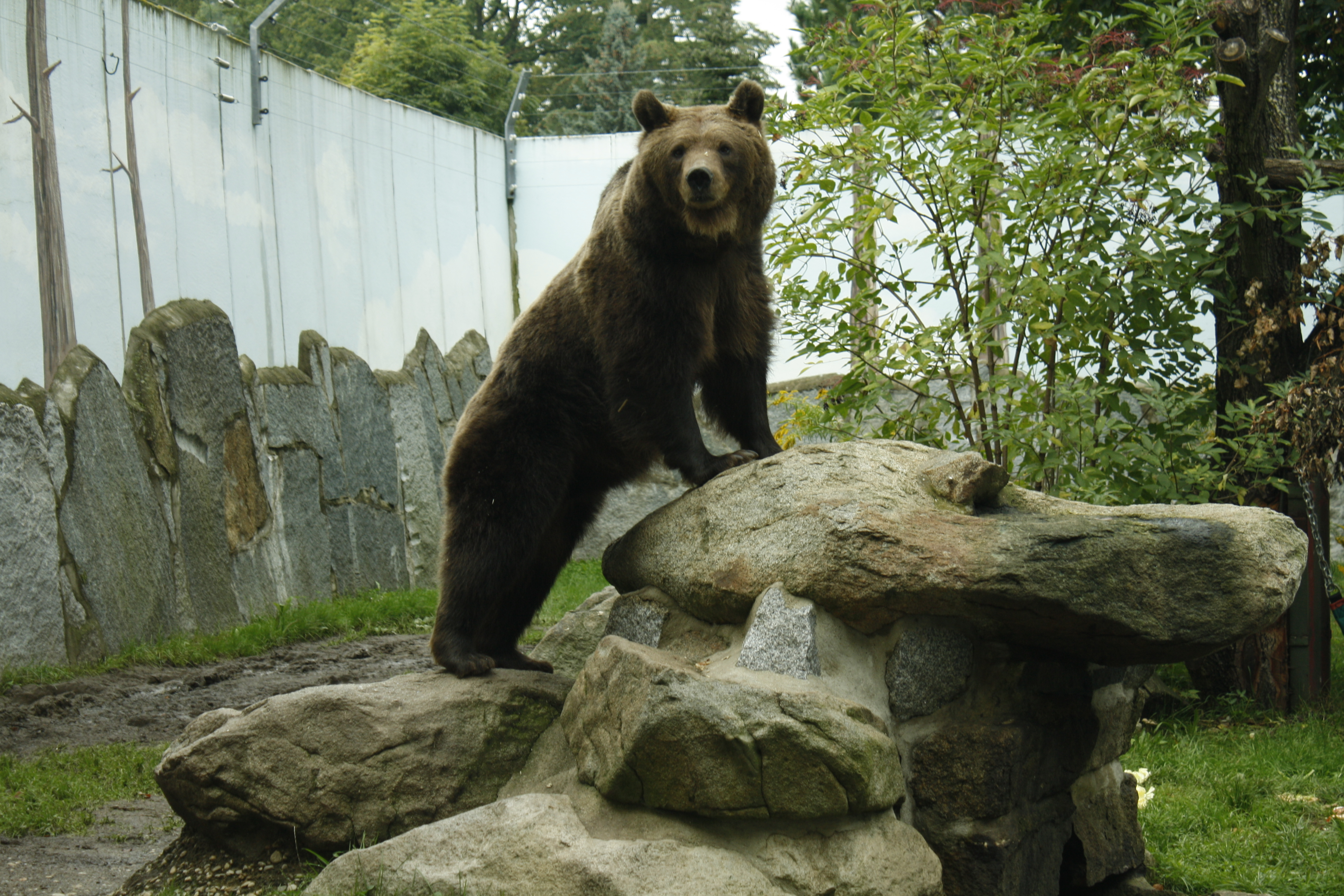 Grizzlybärin Jane (geboren am 19. Januar 1996 im Zoo Hoyerswerda[1]) im Tier- und Kulturpark Bischofswerda, Foto: Juliane Gude